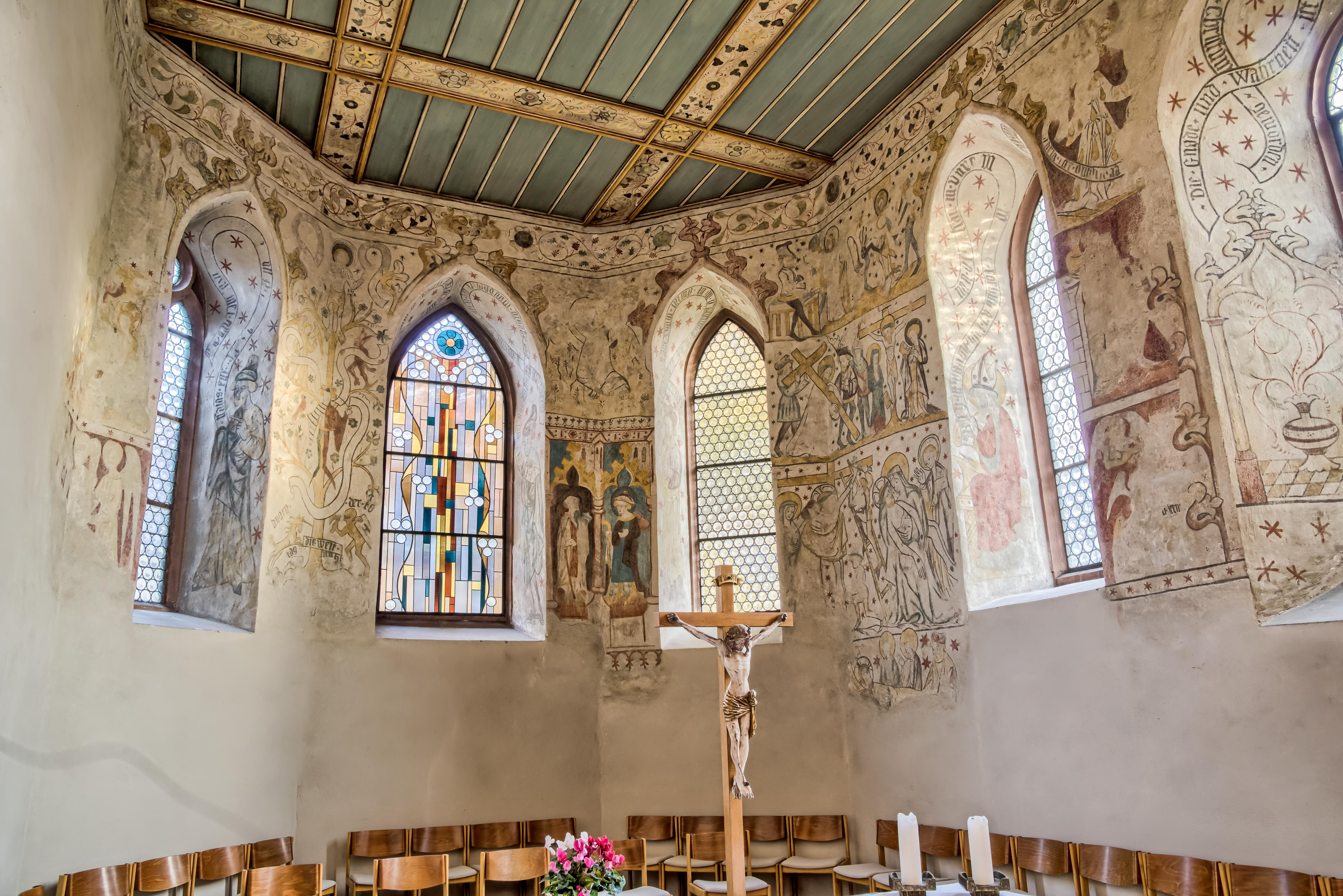 Bilder von St. Laurentius in Bischoffingen Blick in den Chor mit der Bemalung aus dem 14. / 15 Jahrhundert Ganz links Fenster 1, ganz rechts Fenster 5